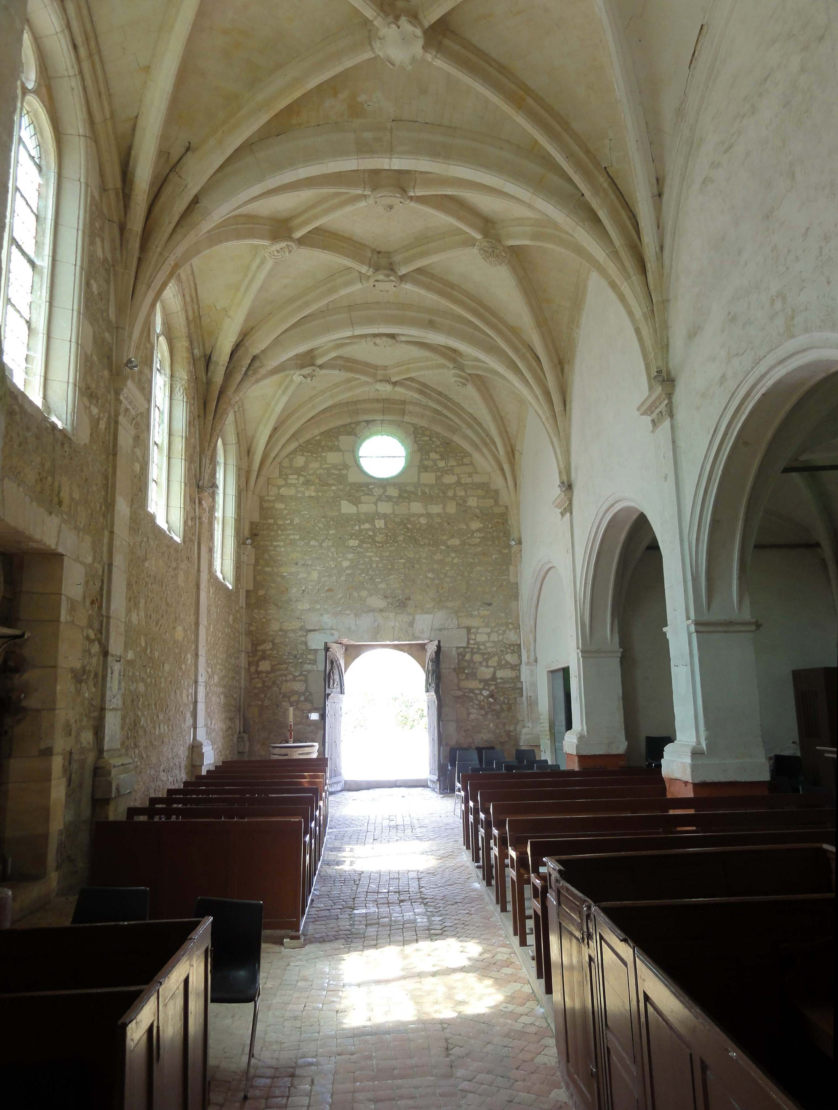 Intérieur de l'église (voir titre).